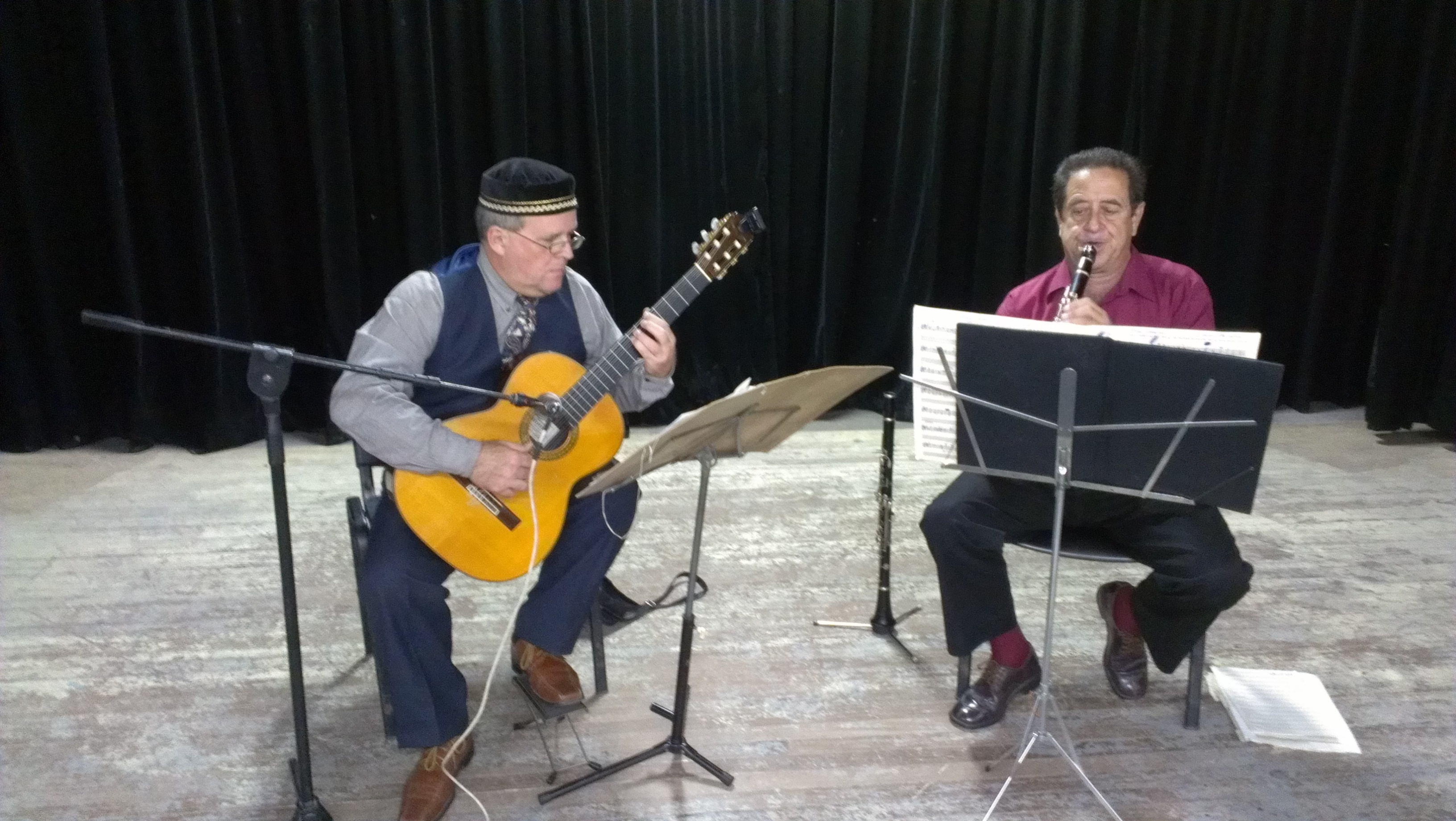 Concierto por el 50 Aniversario de los Beatles